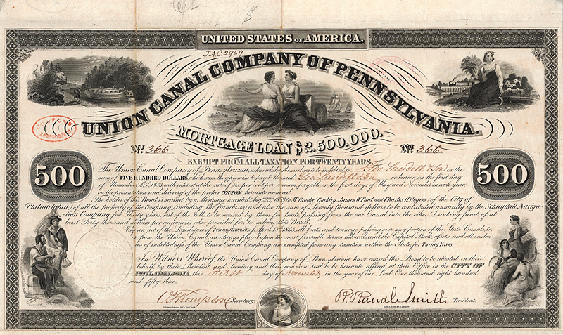 Bond über 500 $ von der Union Canal Company of Pennsylvania vom 1. November 1853